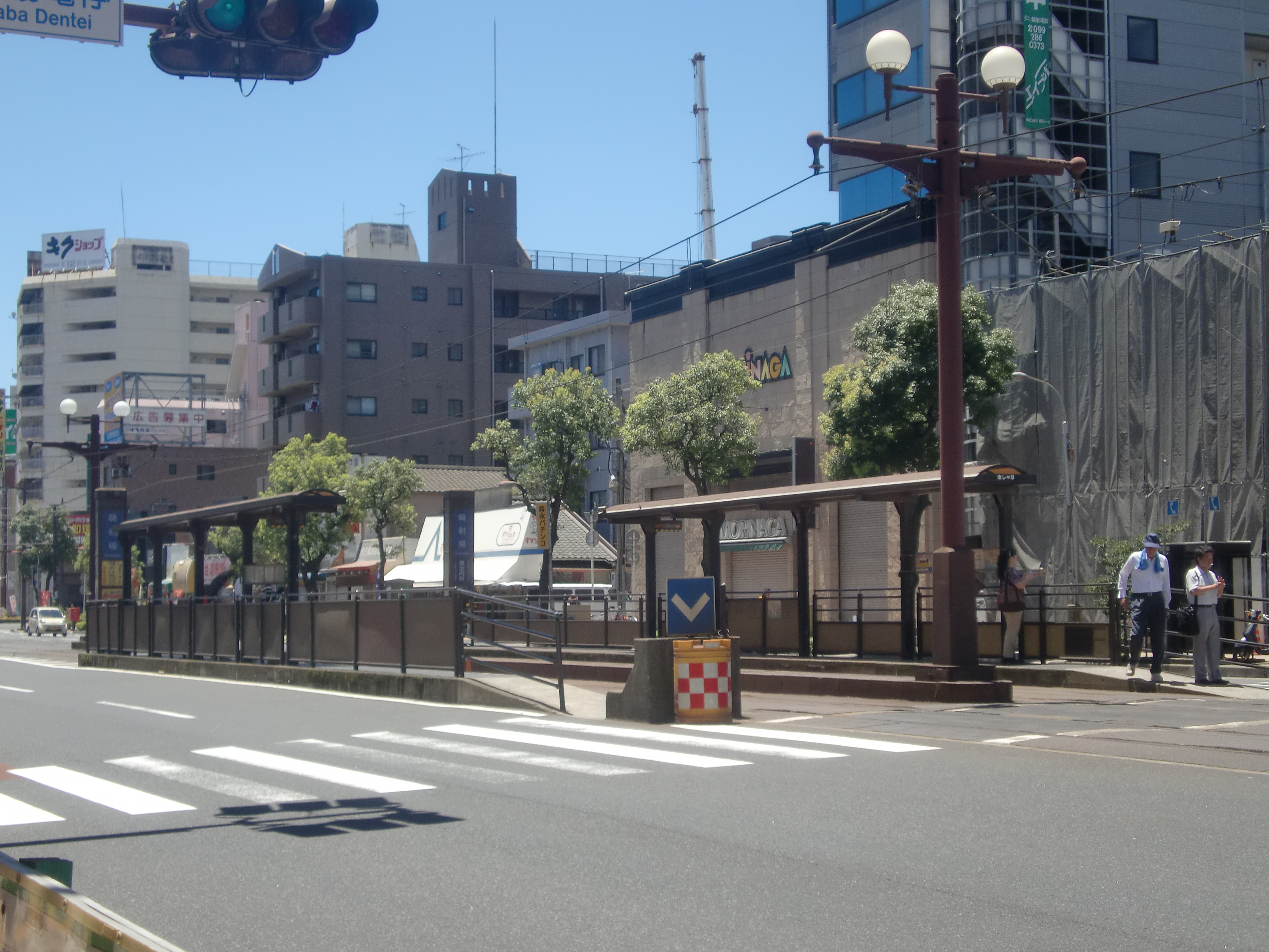 騎射場駅外観。